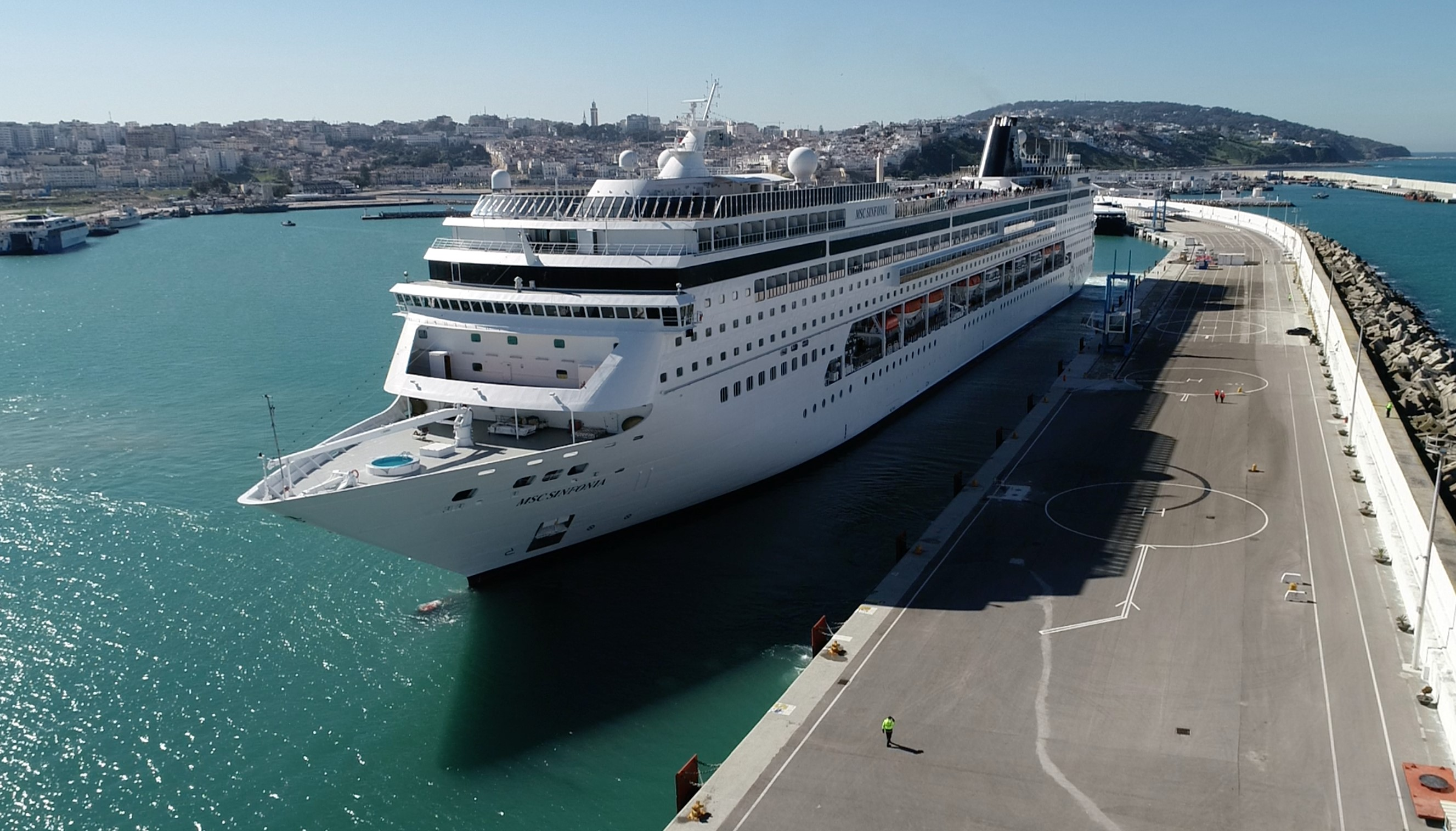 Accostage d'un bateau au quai de croisière du Port de Tanger Ville